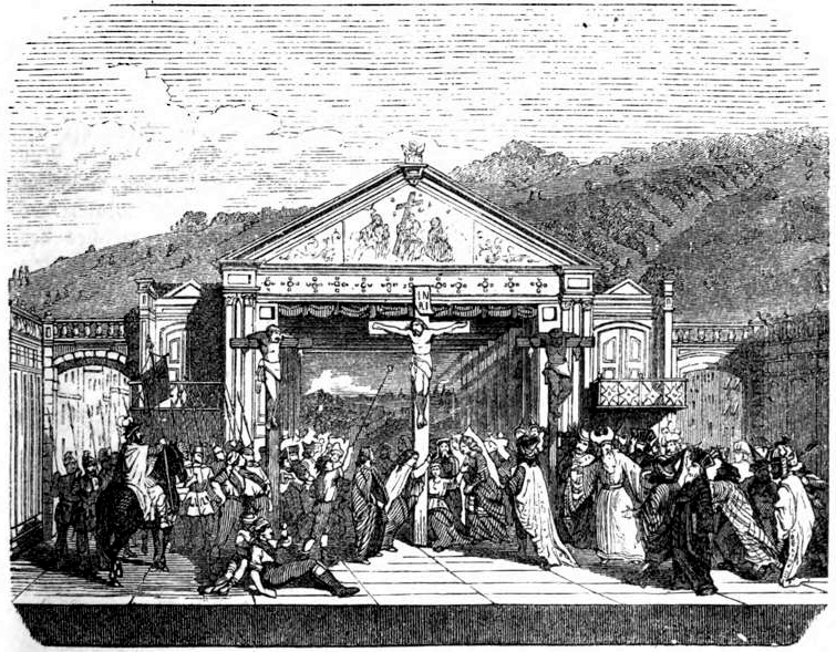 Passionsspiel in Oberammergau